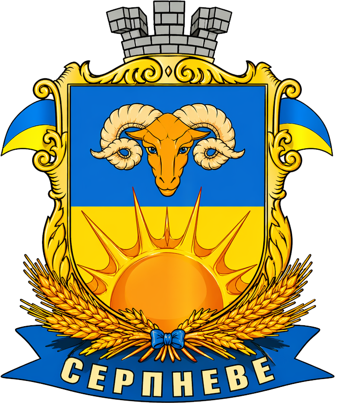 герб смт Серпневе